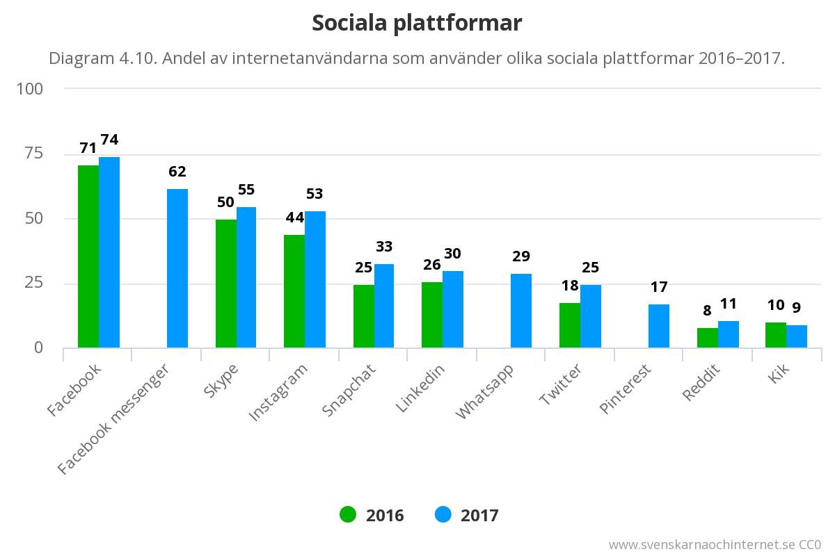 Andel av de svenska internetanvändarna som använder olika sociala plattformar 2016–2017. Siffror från undersökningen "Svenskarna och internet 2017".